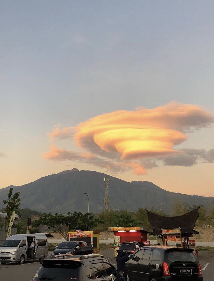 Gunung Ungaran yang terletak di Kabupaten Semarang, Provinsi Jawa Tengah Gunung ini termasuk kategori Gunung berapi walaupun belum ada data yang jelas